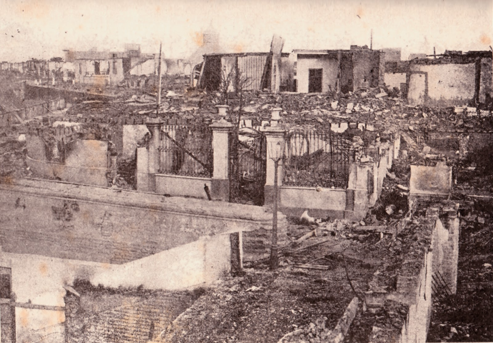 Rancho de Don Dionisio Derteano despues de la batalla